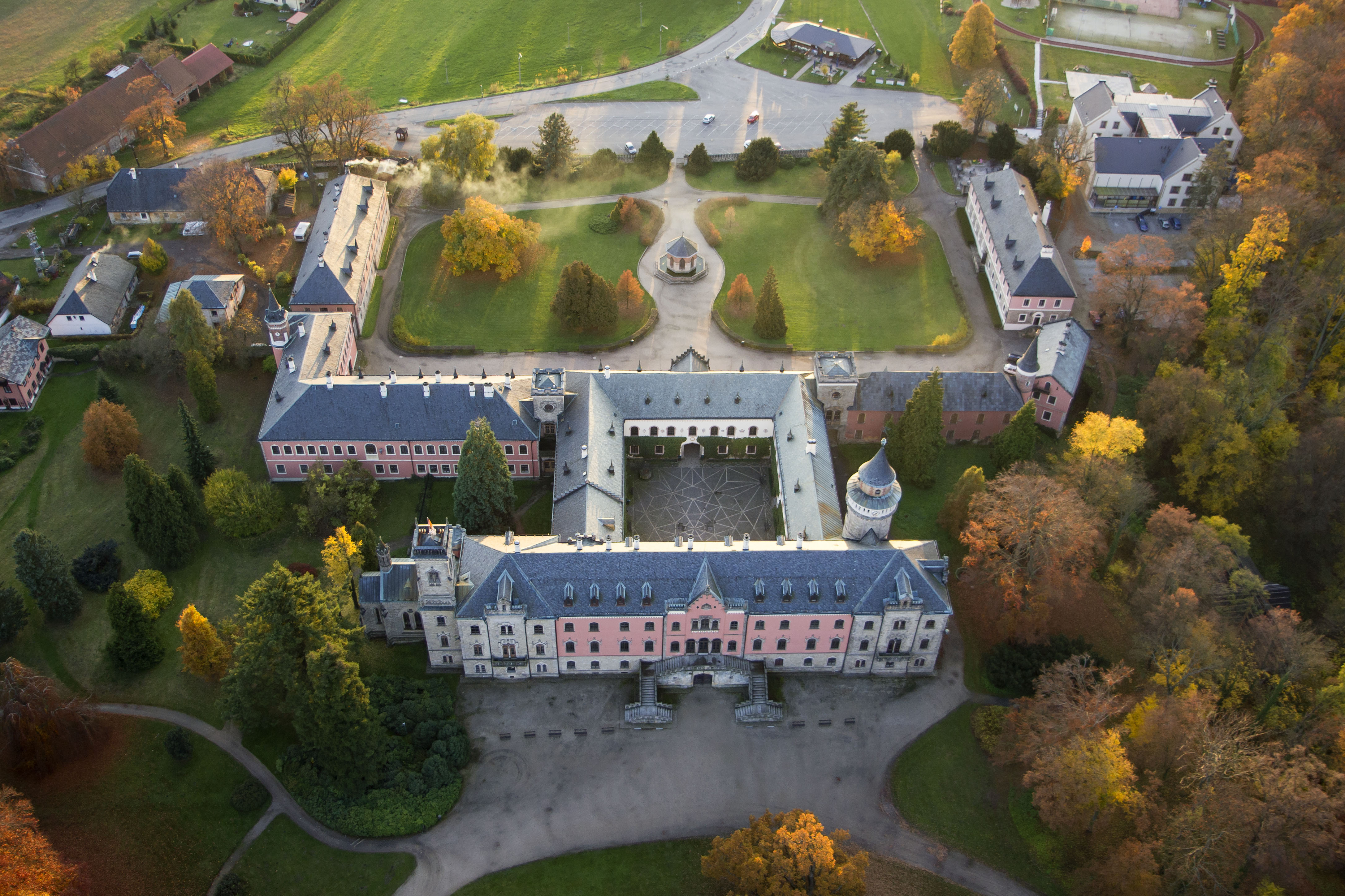 Zámek Sychrov, Sychrov 1, Sychrov (okres Liberec).